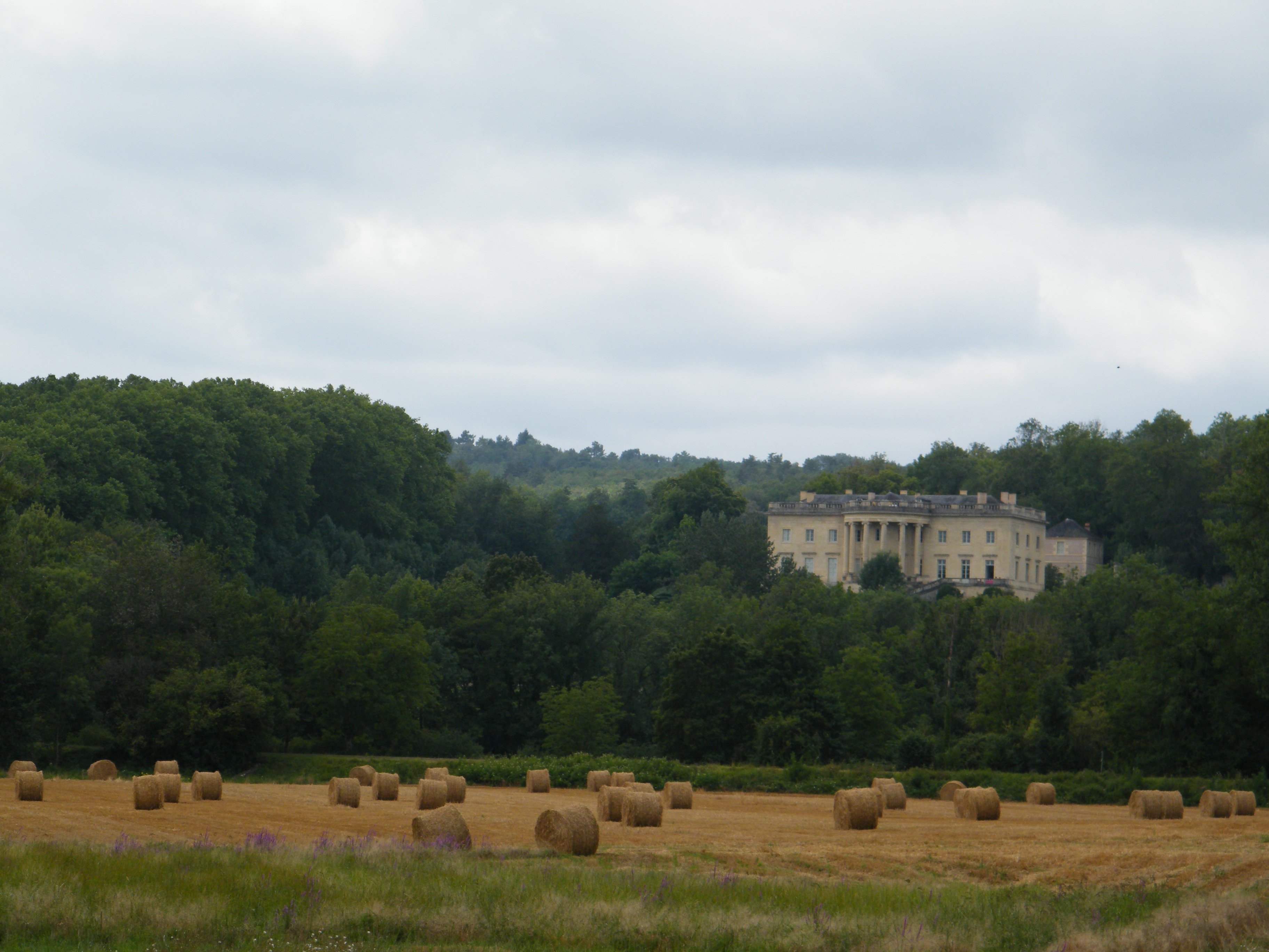 la Maison-Blanche en Dordogne